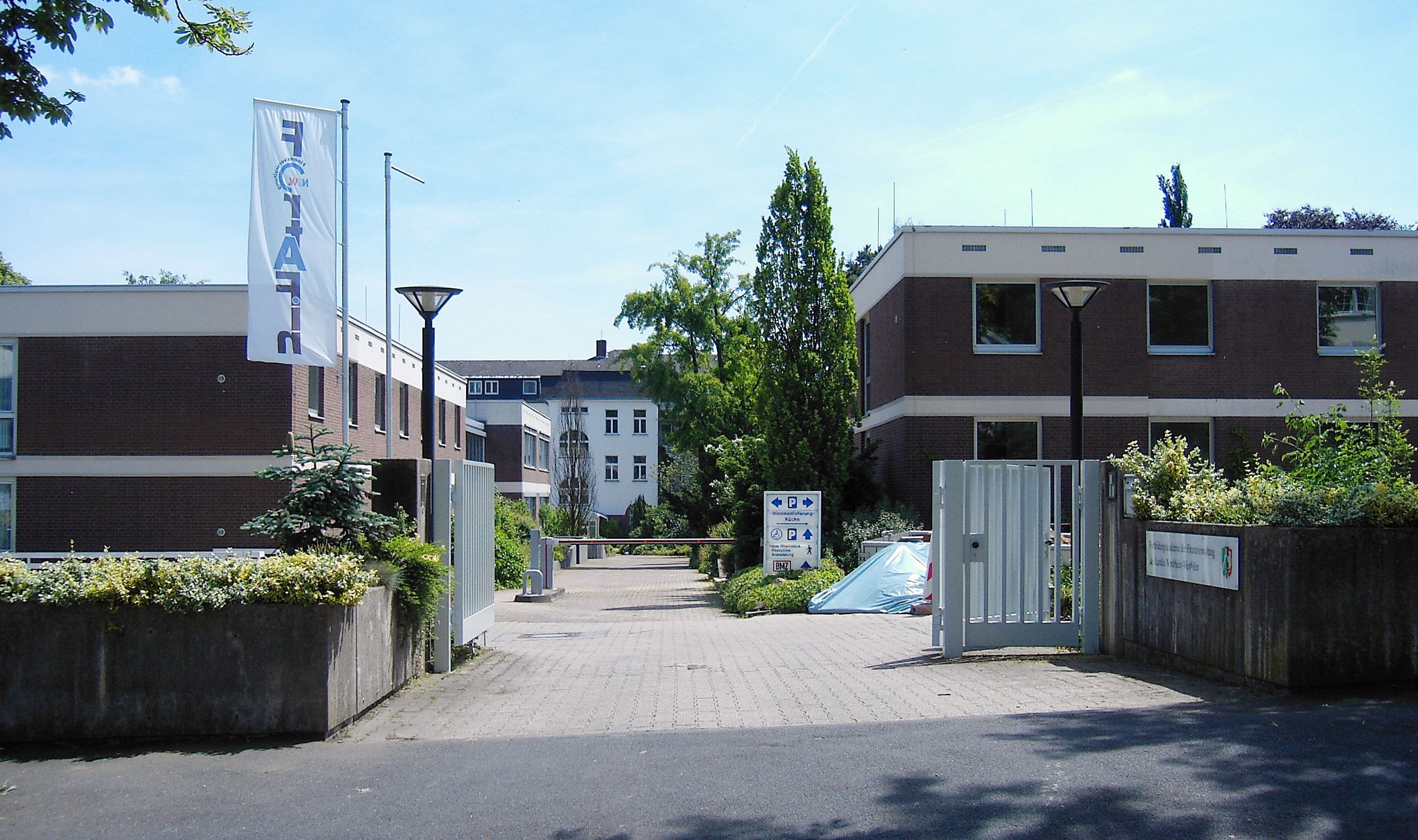 Fortbildungsakademie der Finanzverwaltung Nordrhein-Westfalen, bis September 2018 im Bonner Ortsteil Schweinheim.